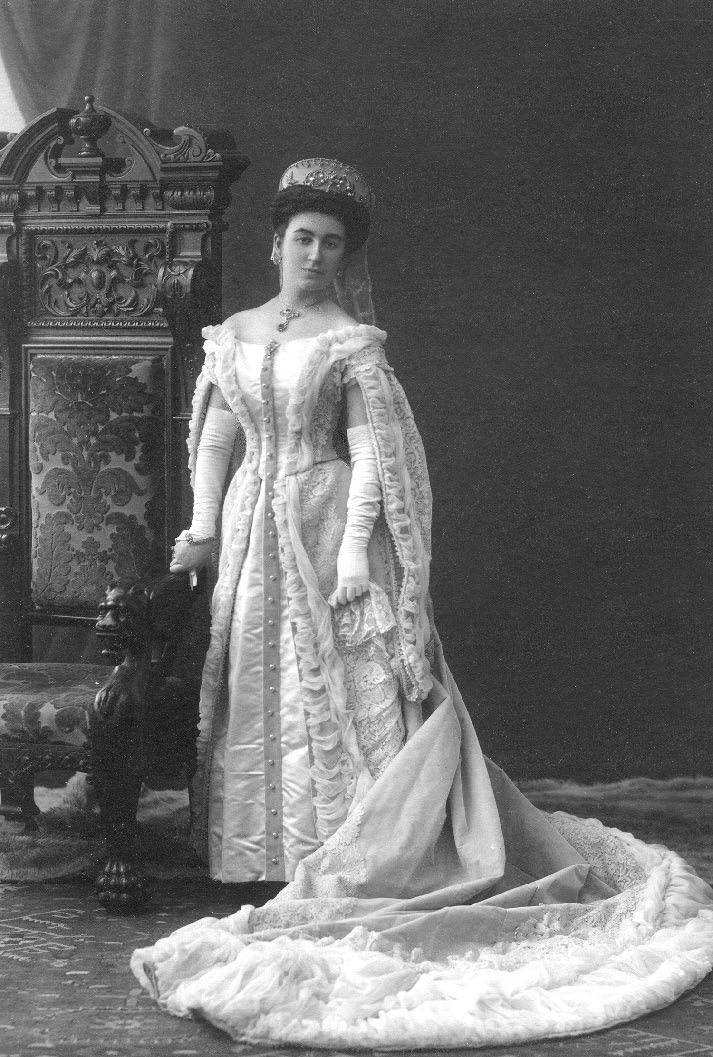 Вера Владимировна Комстадиус (урожд. Малама)